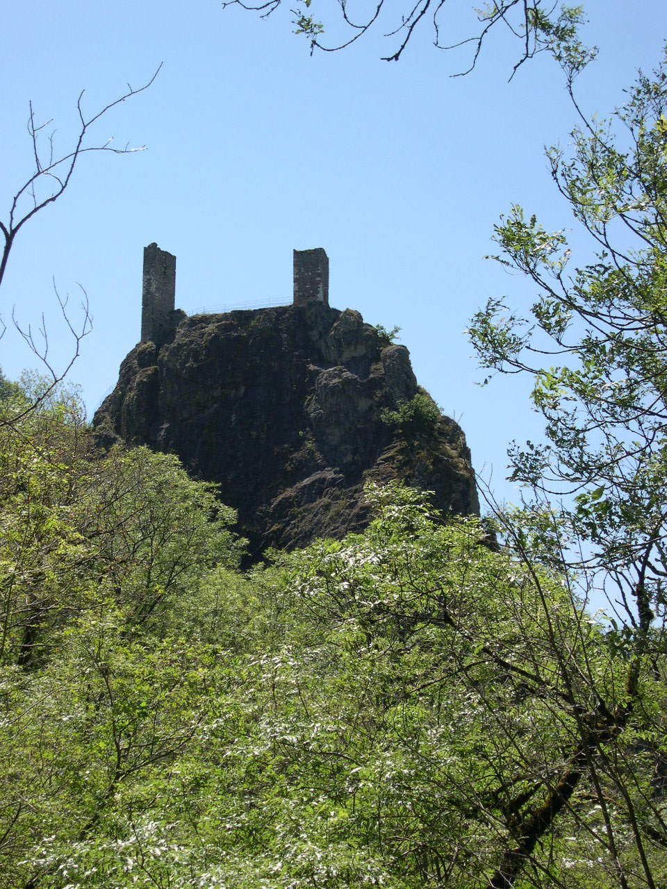 Photo de Peyrusse-le-Roc en aveyron(12)